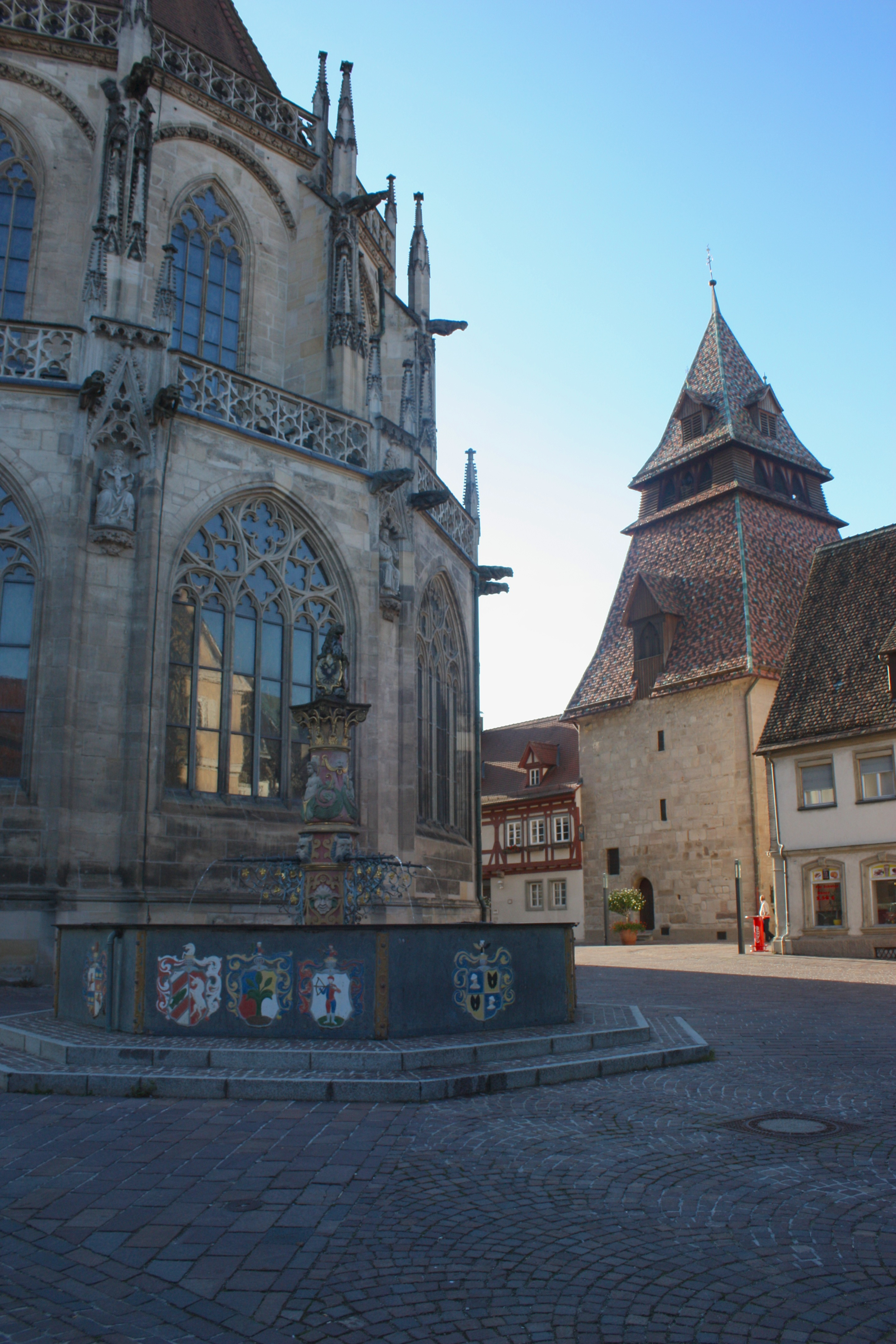 Glockenturm von Südosten, links daneben das Mesnerhaus des Münsters, im Vordergrund der Löwenbrunnen